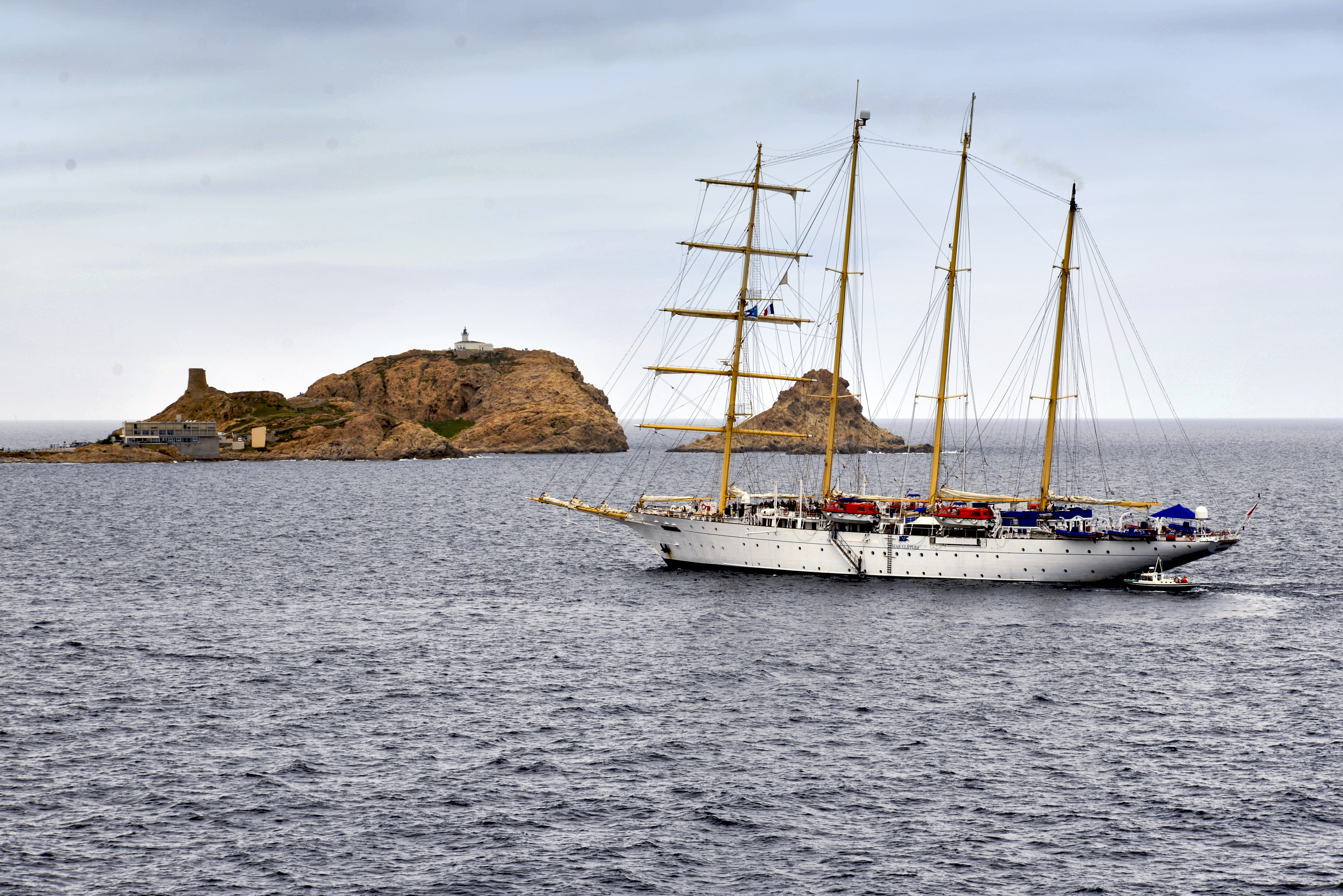 L'Île-Rousse, Balagne (Haute-Corse) - Star Clipper, quatre mâts goélette, entrant au port